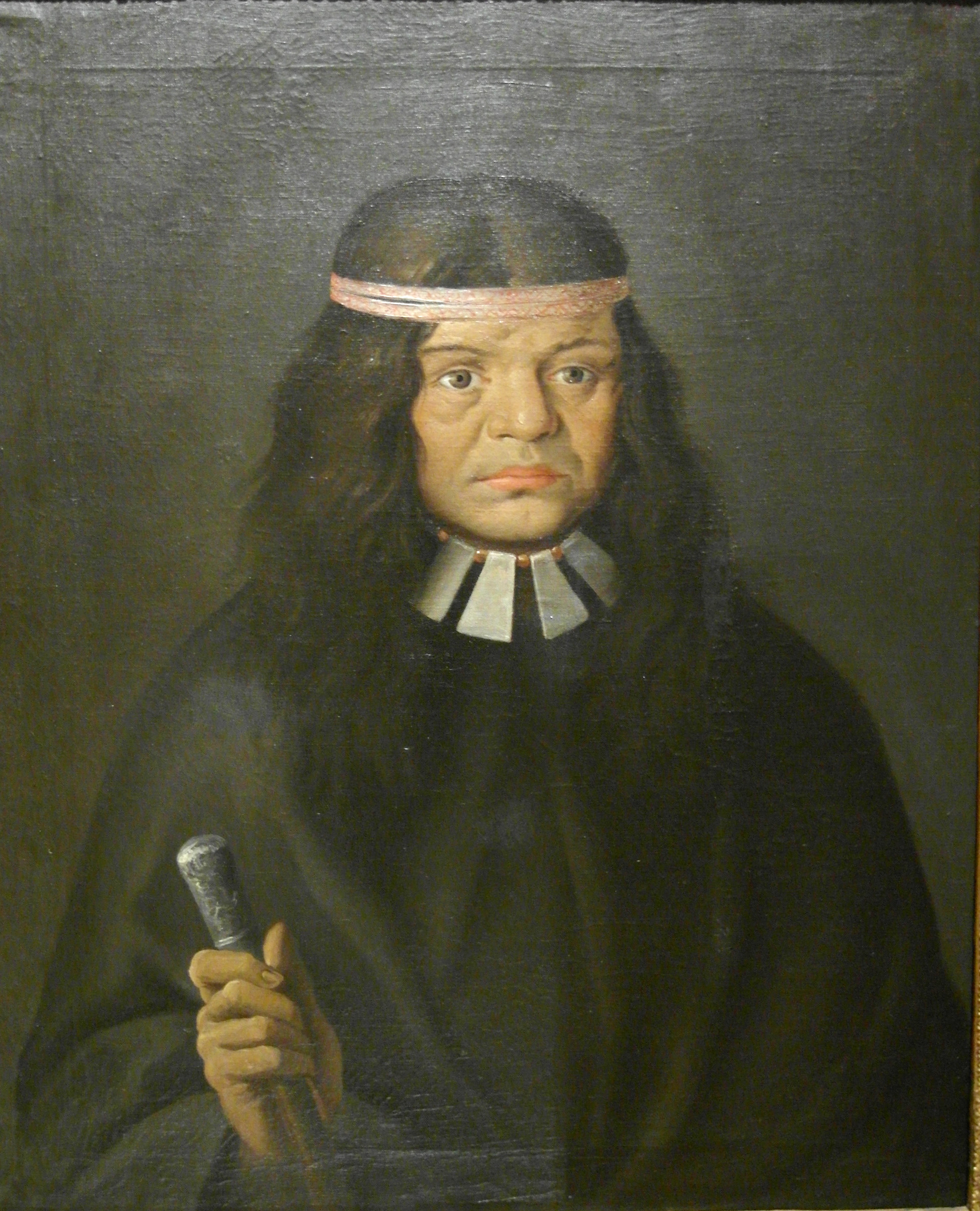 Catiguala, cacique de los huiliches, siglo XVIII. Retrato de José del Pozo (ca. 1757–1821).